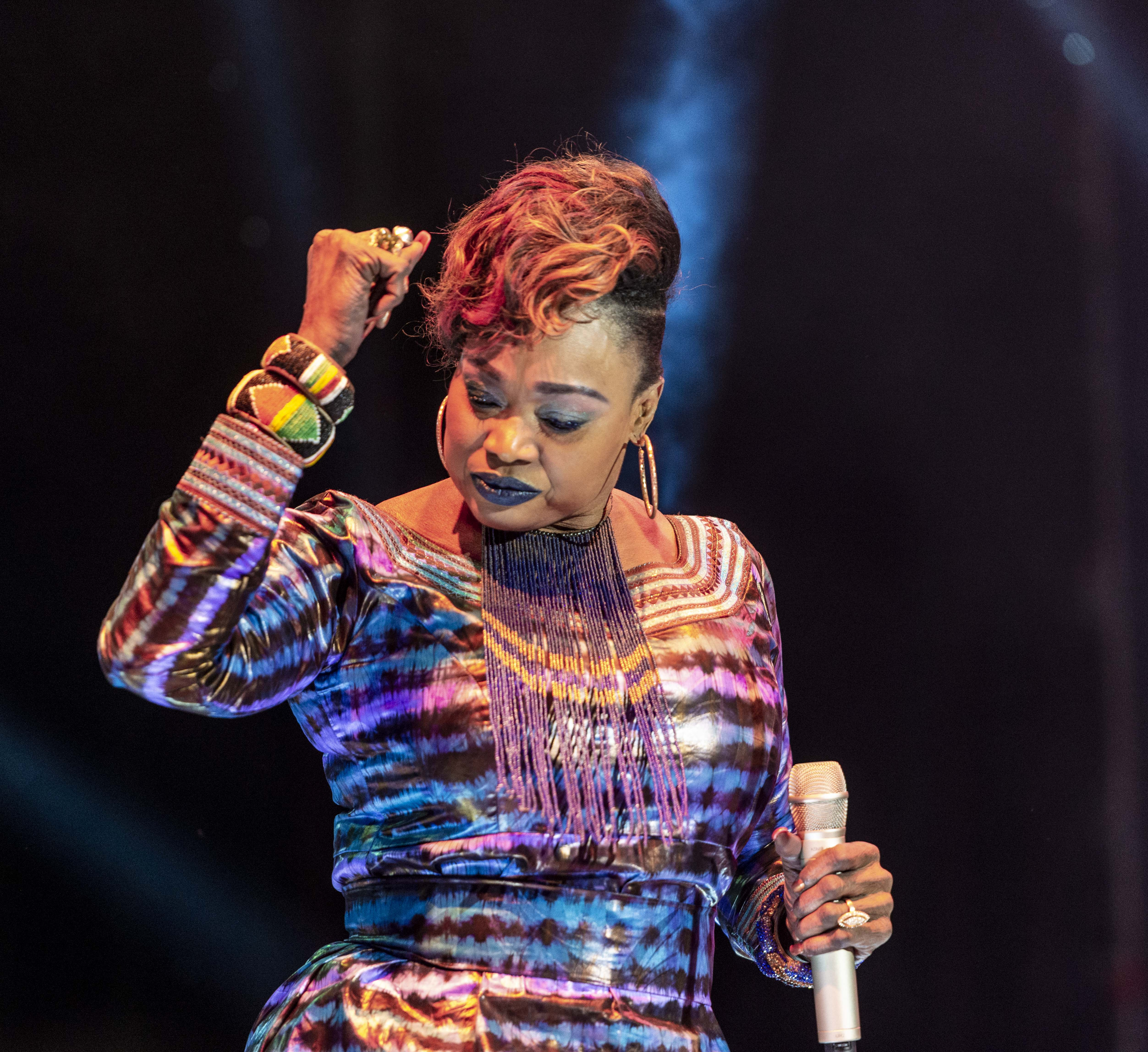 La tarde y la noche de ayer sábado, 12 de mayo, contaron con decenas de propuestas culturales para celebrar las fiestas. En la plaza de Conde de Barajas el atardecer arrancaba con poesía y la música de Tulsa y Abraham Boba. Madrid se preparaba para una noche con músicas de raíz y sus revisiones más contemporáneas, desde el flamenco a la canción africana.